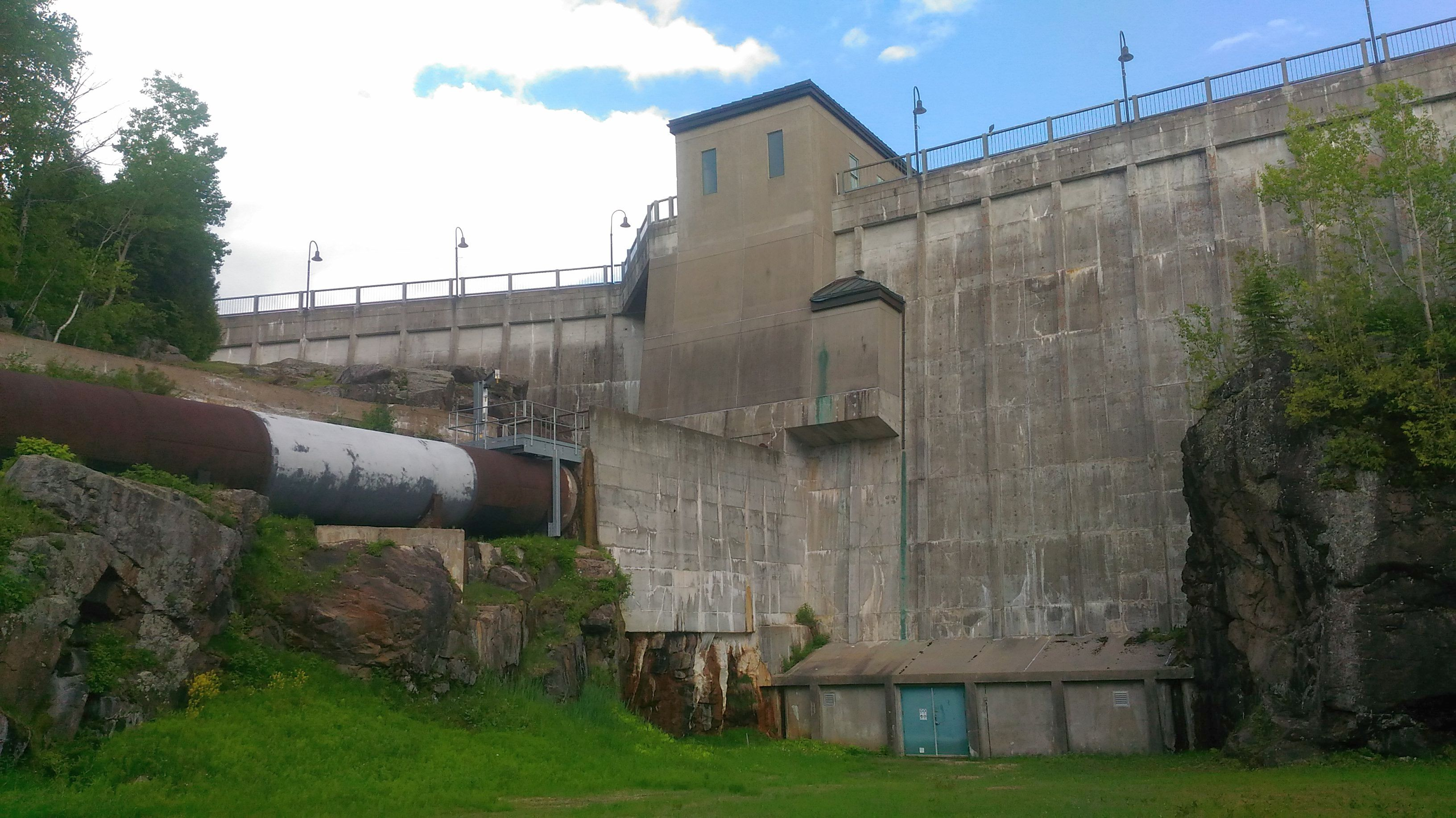 Vue du bâtiment de prise d'eau de la centrale des Sept-Chutes à Saint-Férréol-les-Neiges, Québec.